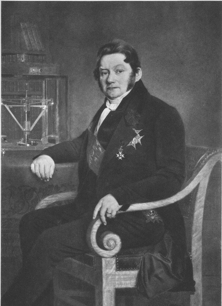 Jöns Jacob Berzelius (1779-1848)